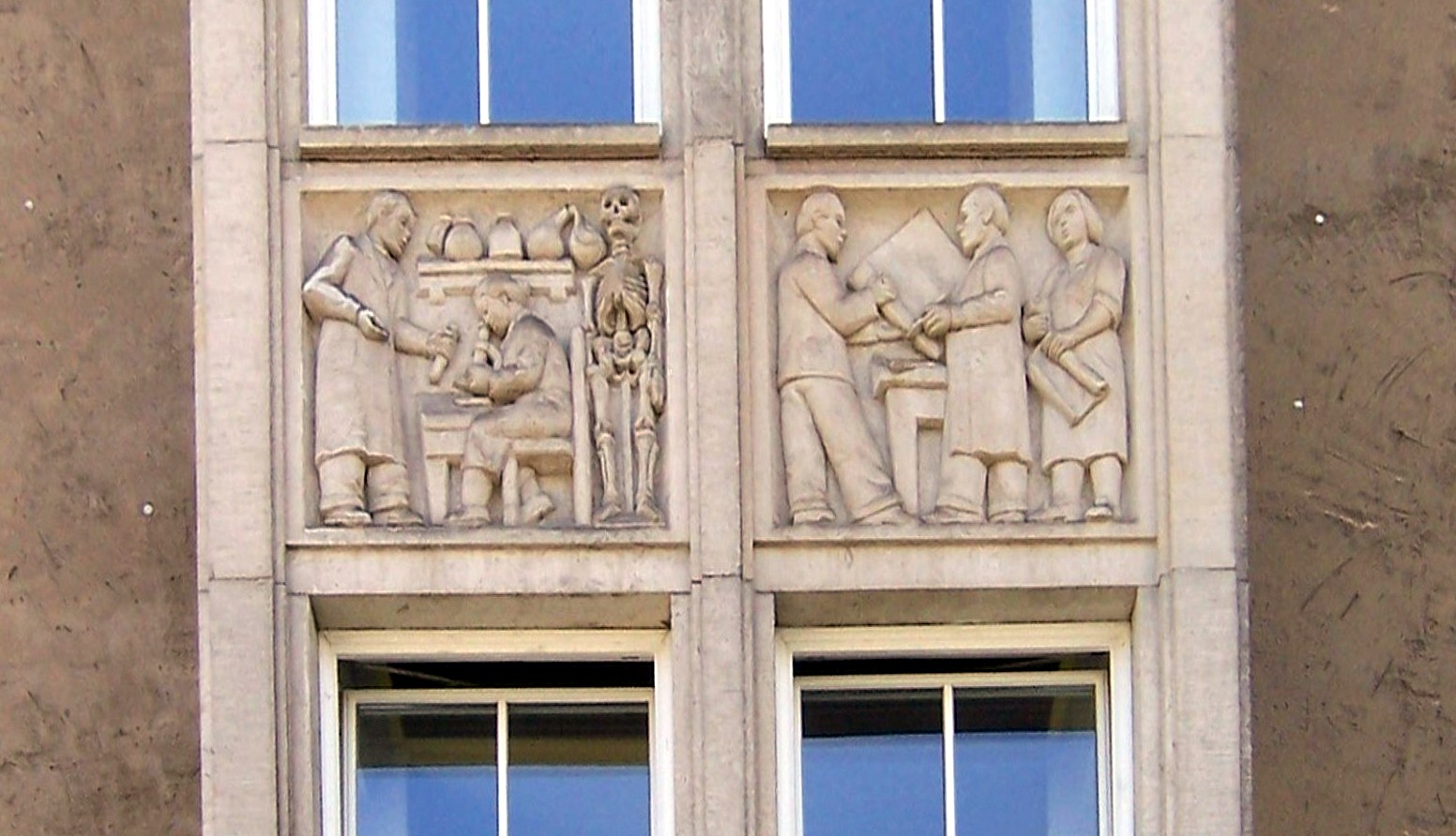 Erkerdetail, Studentenwohnheim Fritz-Löffler-Straße; Relief von Hermann Naumann